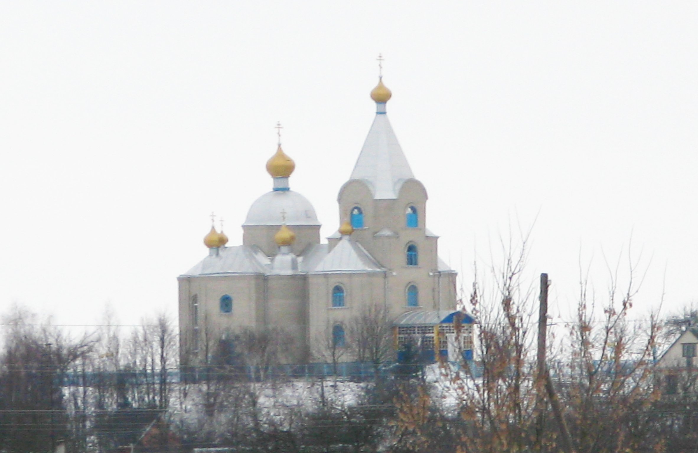 Храм Різдва Божої Матері